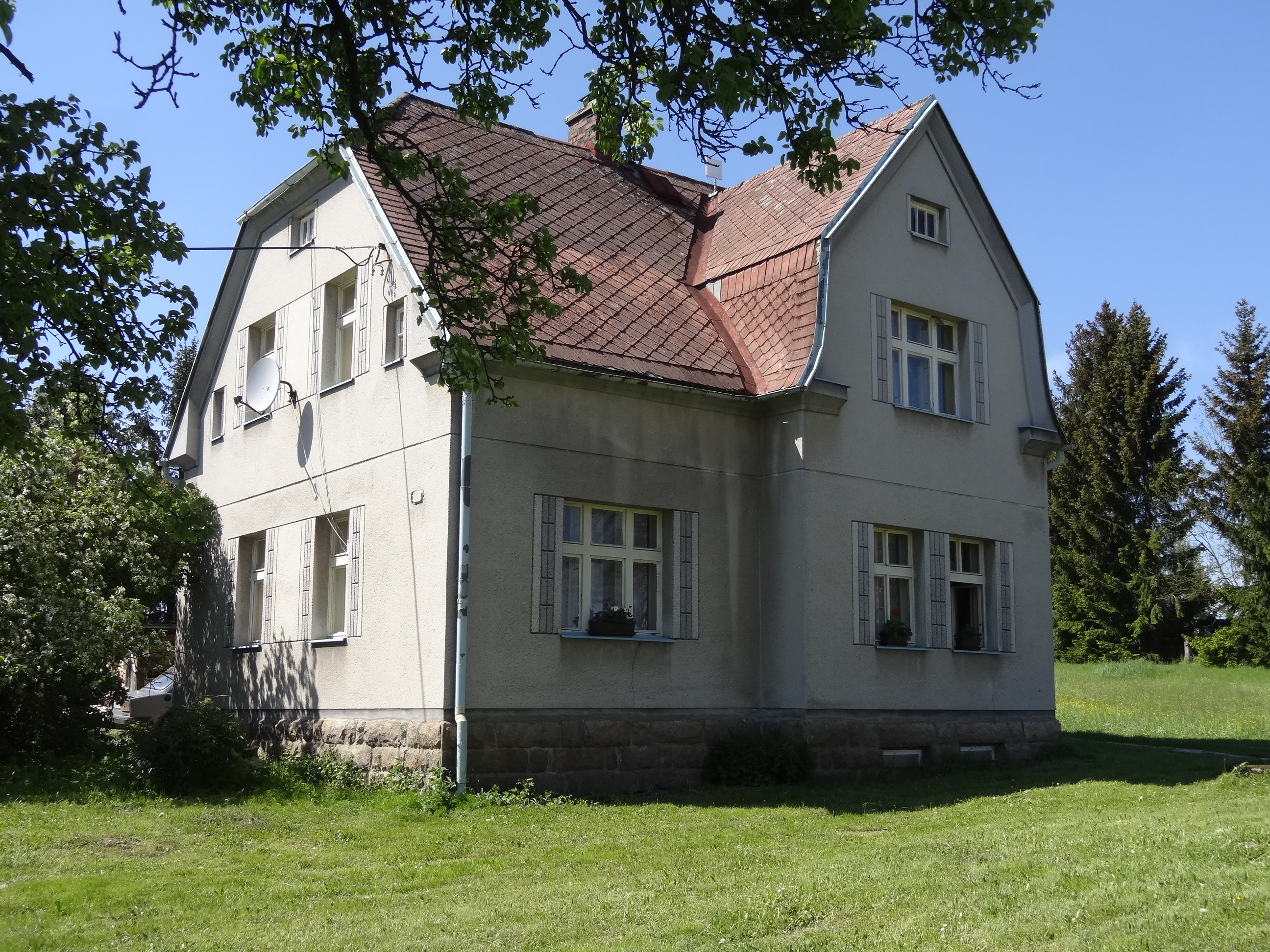 Klíčnov - vilka čp. 16